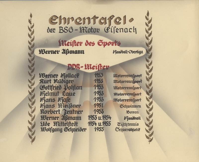 Albumblatt 25 der BSG Motor-Eisenach aus dem Jahr 1955, mit einer Liste der erfolgreichsten Sportler des Vereins.